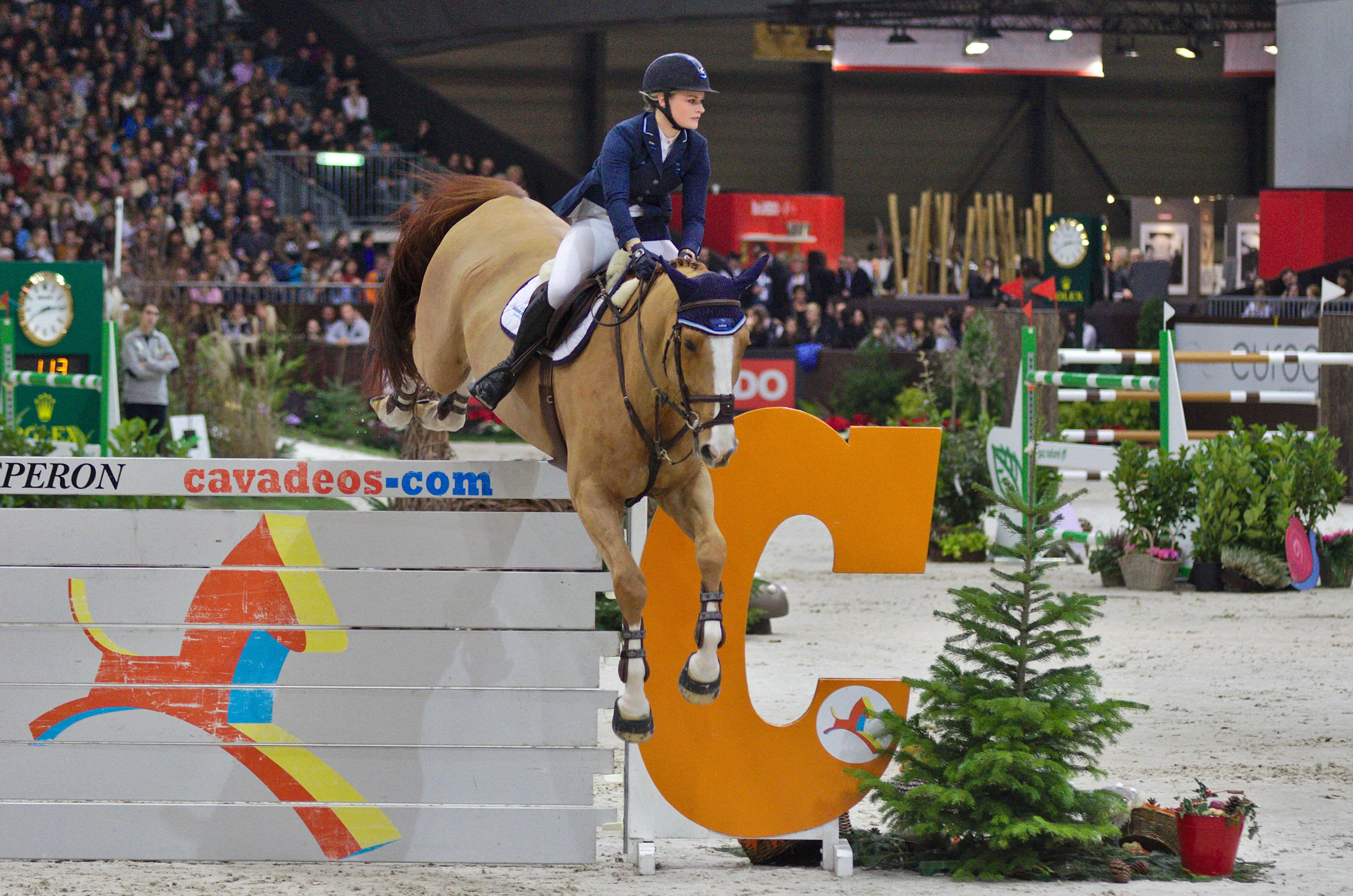 54eme CHI de Genève - 20141213 - Prix Credit Suisse - Kaya Lüthi et Pret à Tout